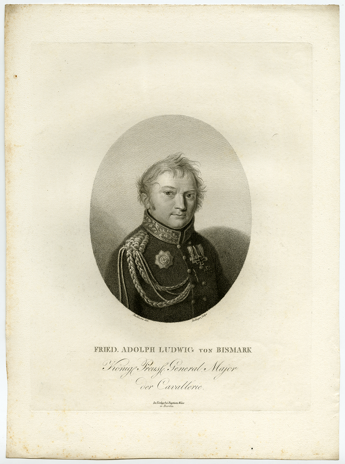 Friedrich Adolf Ludwig von Bismarck (* 1. August 1766 auf Uenglingen (Kreis Stendal); † 12. April 1830 in Berlin) war königlich preußischer Generalmajor und zuletzt kommandierender General im Herzogtum Sachsen sowie Erbherr auf Schönhausen.